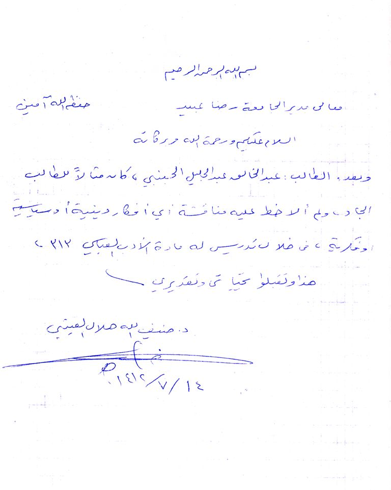 شهادة من الدكتور ضيف الله العتيبي عضو هيئة تدريس بجامعة الملك عبد العزيز بجدة بحق تلميذه عبد الخالق الجنبي.